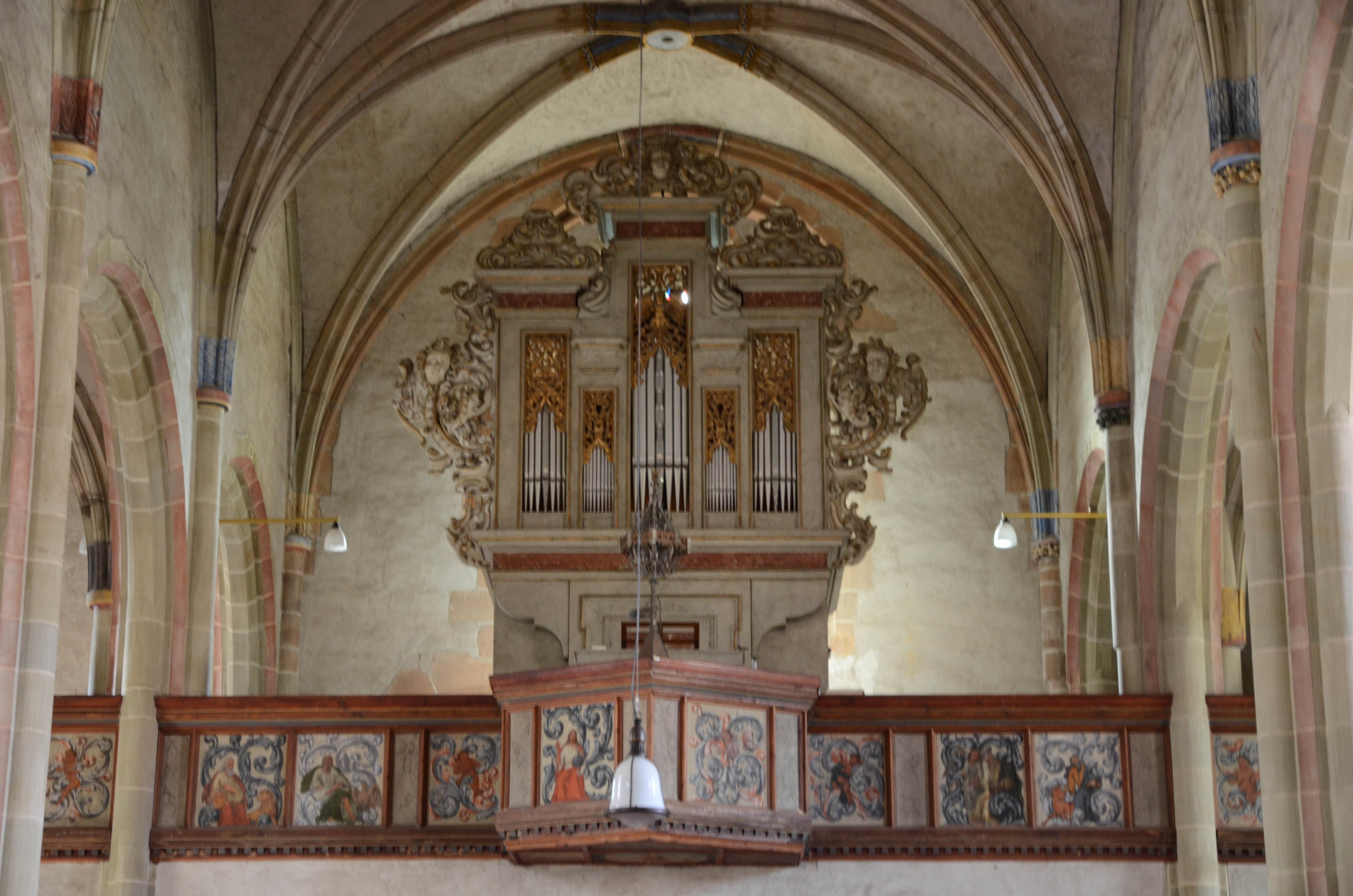 Marienkirche in Königsberg in Bayern